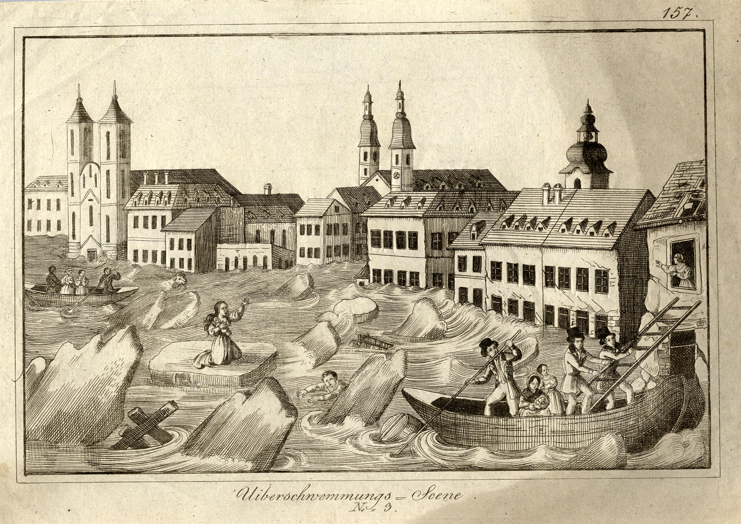 Budapest, Überschwemmungsszene aus 1838, Kupferstich, um 1838